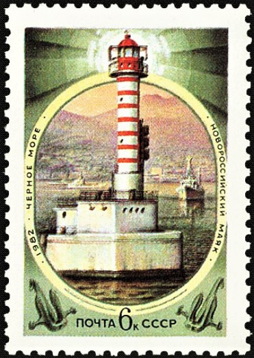 Почтовая марка СССР. Новороссийский маяк . Номер в каталоге ЦФА 5358